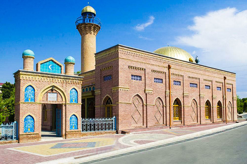 Naxçıvan Cümə məscidi